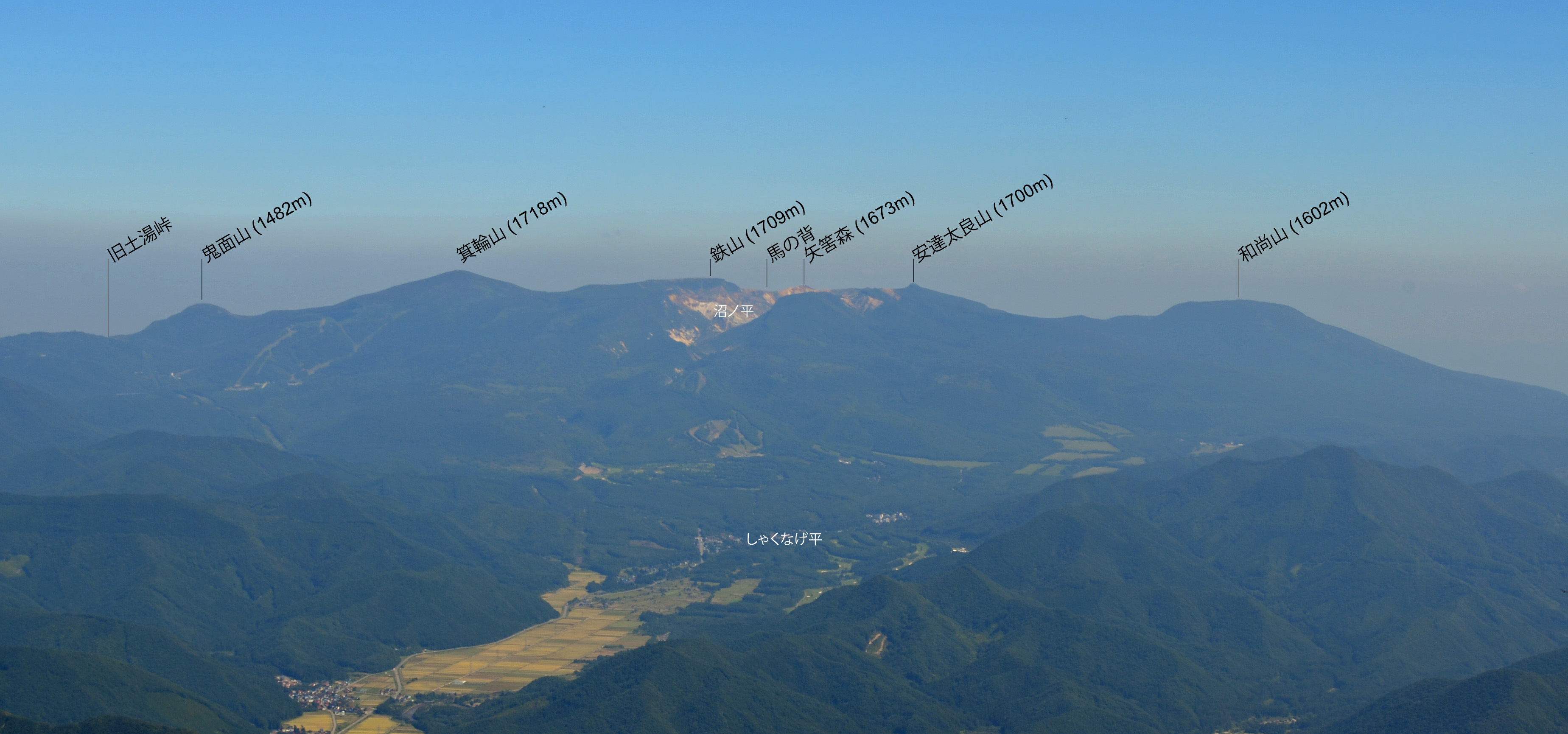 磐梯山から望む安達太良山系の全容(山名・標高を拡大して再投稿)